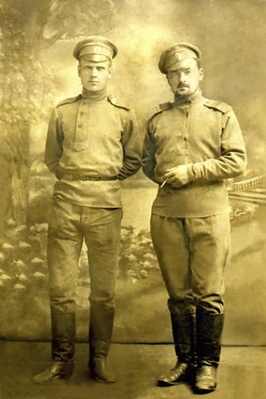 Макар Касцевіч (Краўцоў) у войску.